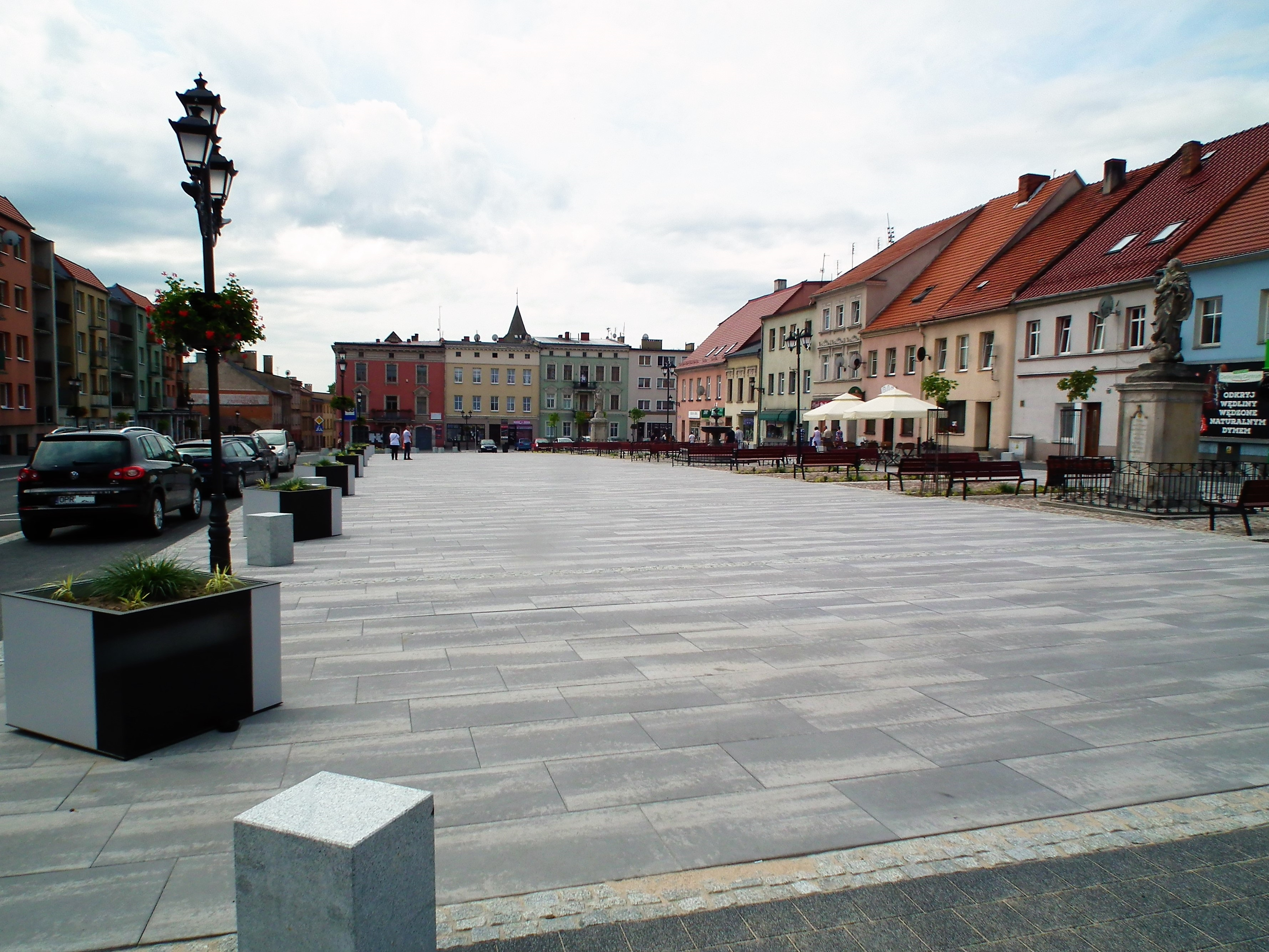 Rynek w Białej Prudnickiej.